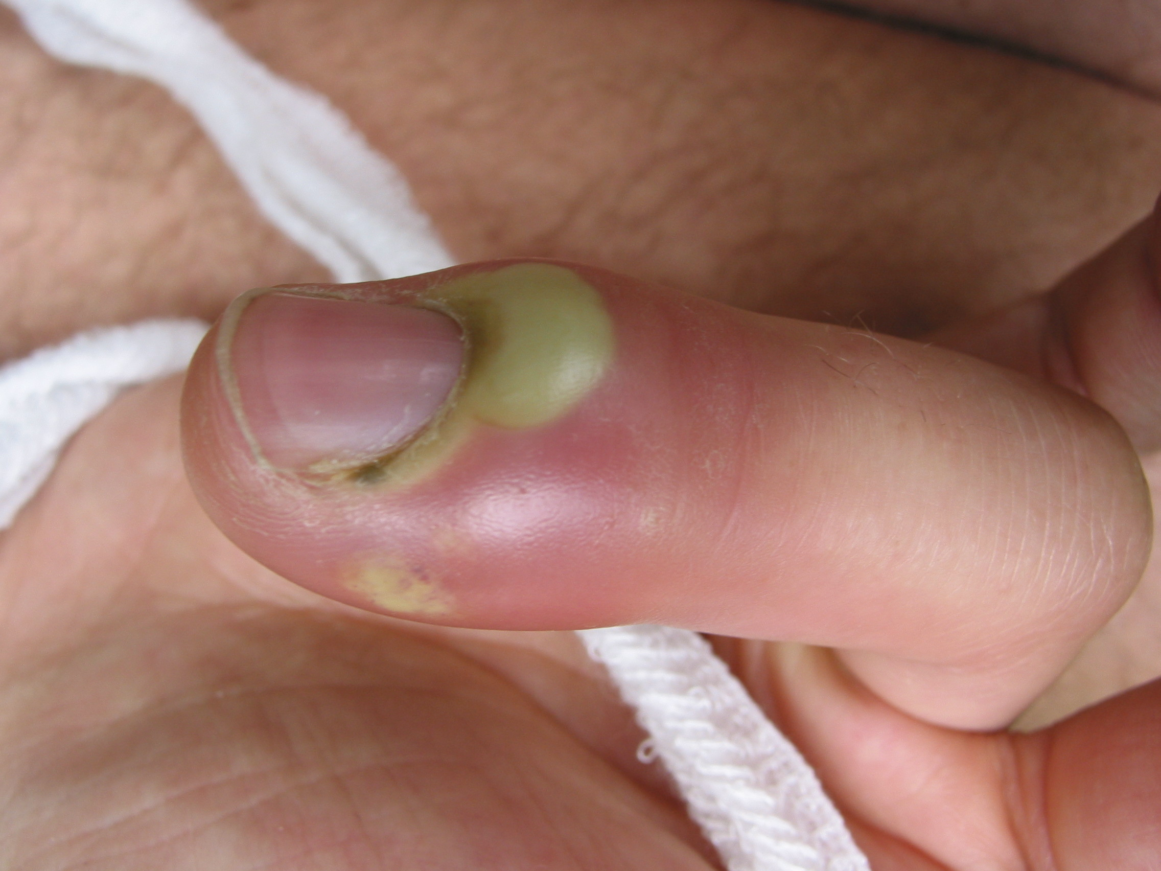 Nagelbettentzündung (Paronychie)